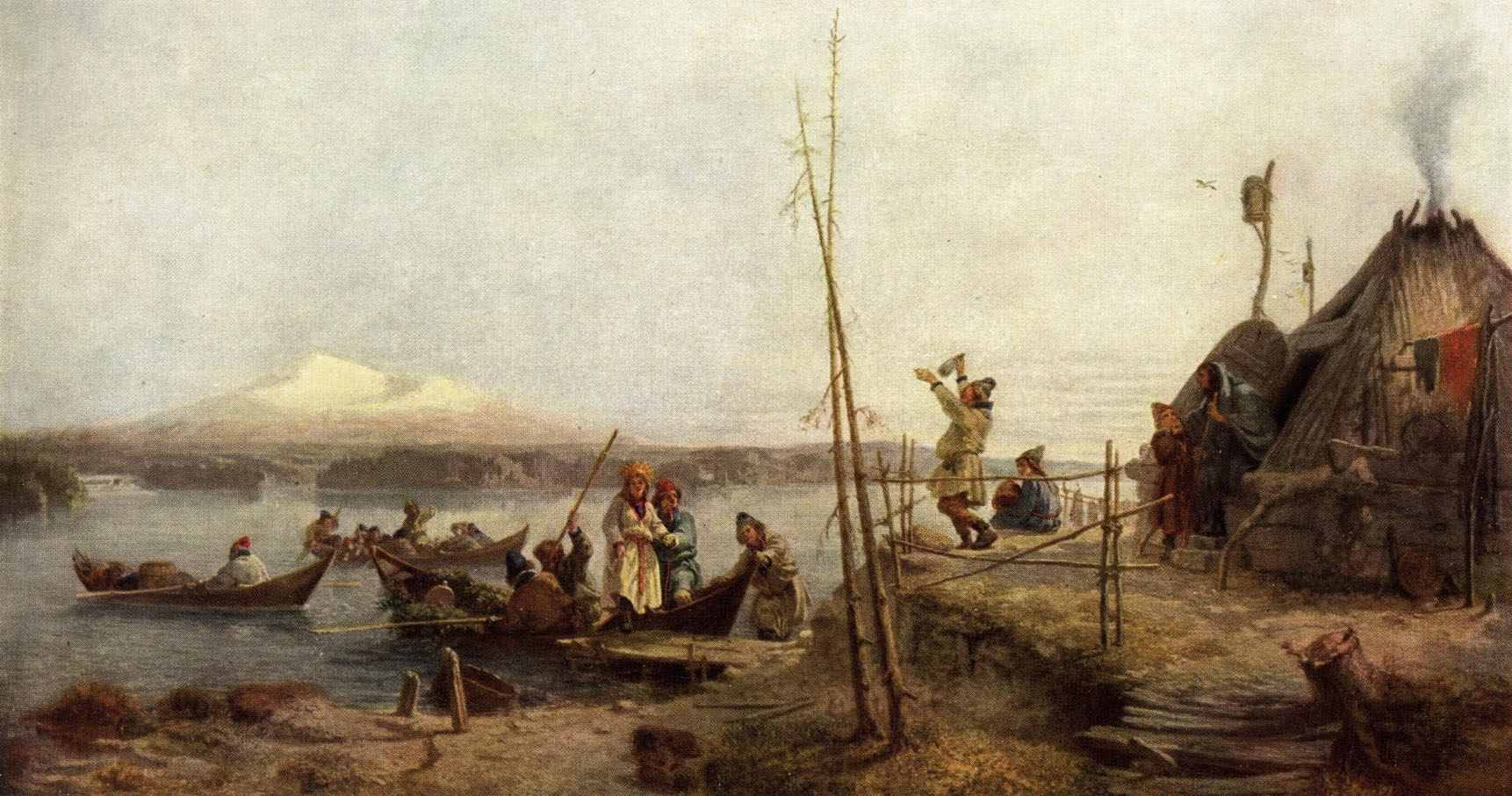 Brudfärd på Hornavan. Oljemålning. Ett lapskt brudpar landar vid Hornavans strand efter att ha blivit sammanvigt i något litet kapell. Den vitklädda med brudbälte och krona smyckade bruden skall just stiga i land stödd av brudgummen. Tvenne båtar följa, den ena med bröllopsgäster, den andra med enroddare och diverse packning. Ur den närliggande kåtans taköppning bolmar röken. De hemmavarande ha tillrett en präktig bröllopsmåltid, bestående av kokt och stekt, färskt renkött, kokta laxöringar och foreller, vildfågelsägg samt till efterrätt, joama kraftse, en sorts kräm av renmjölk blandad med saft av syrgräs. Dessutom har från nybyggarna dagen till ära anskaffats potatis, smör och tunnbröd. Såsom dryck användes renmjölk, blandad med snö, samt kaffe. Till det senare serveras tunna skivor av renost. Å den vackra målningen avteckna sig i bakgrunden snötäckta fjäll mot blekblå vårhimmel. - Gerda Cederblom.